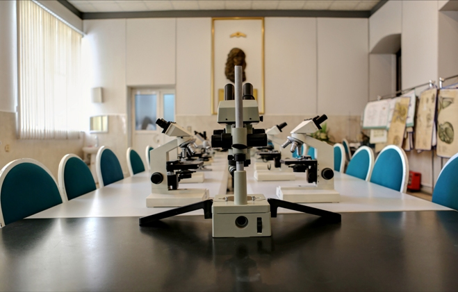 Tefekkur